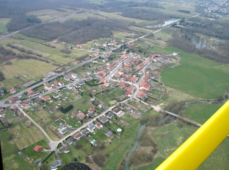 Thiébauménil, vue aérienne, cliché personnel, mars 2005. 800 X 595 pixels Catégorie:Image de commune de Meurthe-et-Moselle